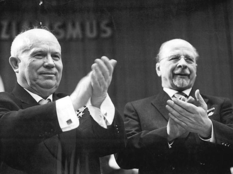 Zentralbild Kollektiv Me-Qu 16.1.1963 VI. Parteitag der SED vom 15.-21.1.1963 in der Werner-Seelenbinder-Halle in Berlin (2.Tag). UBz. Unter dem anhaltenden Beifall der Delegierten und Gäste des VI. Parteitages beendete N.S. Chruschtschow, Erster Sekretär des ZK der KPdSU, seine bedeutungsvolle Rede. (V.l.n.r.): N.S. Chruschtschow und der Erste Sekretär des ZK der SED, Walter Ulbricht. (Sturm)